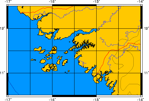 Karte des Bissagos Archipels